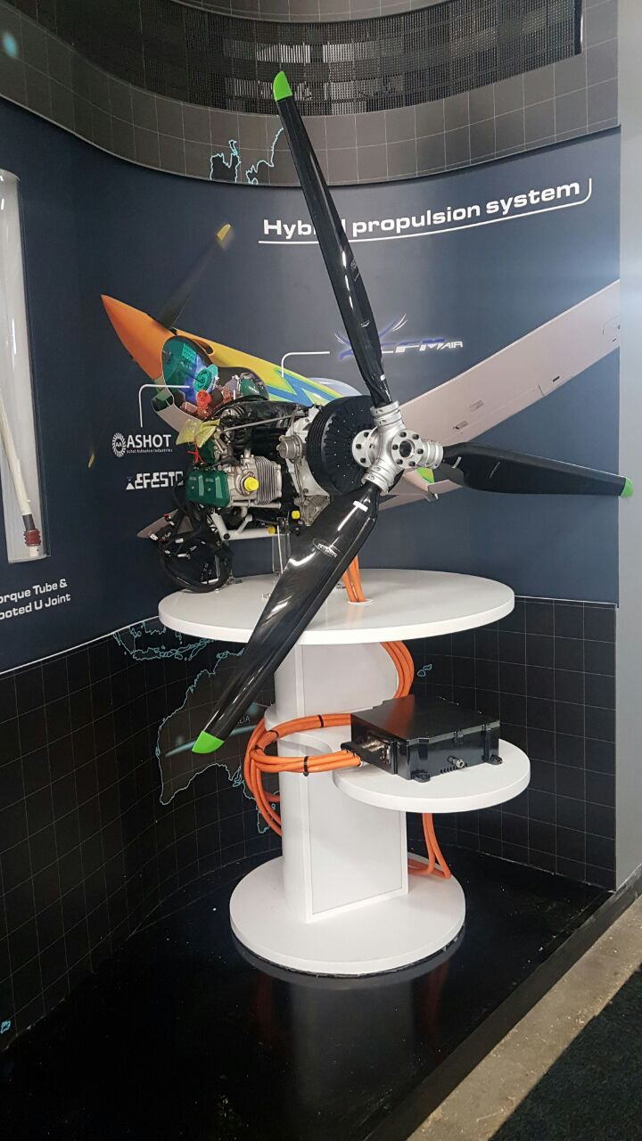 מנוע הברדי - מוצר חדש בפיתוח של עשות אשקלון